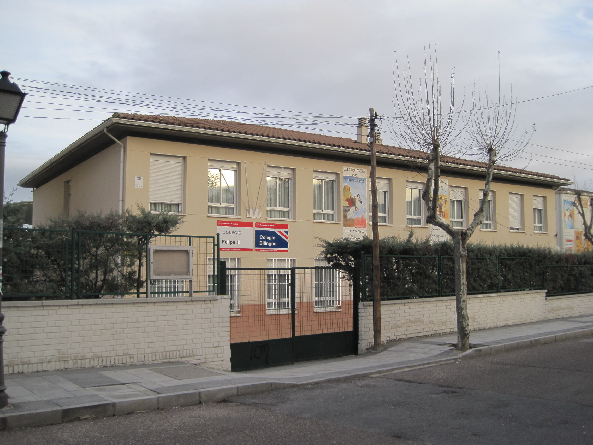 Vista del colegio Felipe II, en El Escorial (Comunidad de Madrid, España).